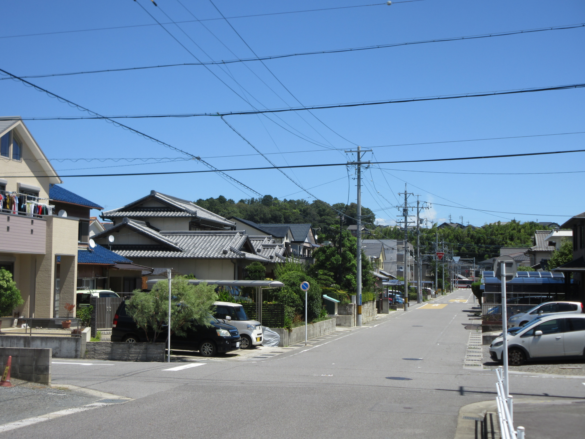 岡崎市寿町